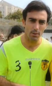 חיים מגרלשווילי במדי בית"ר ירושלים